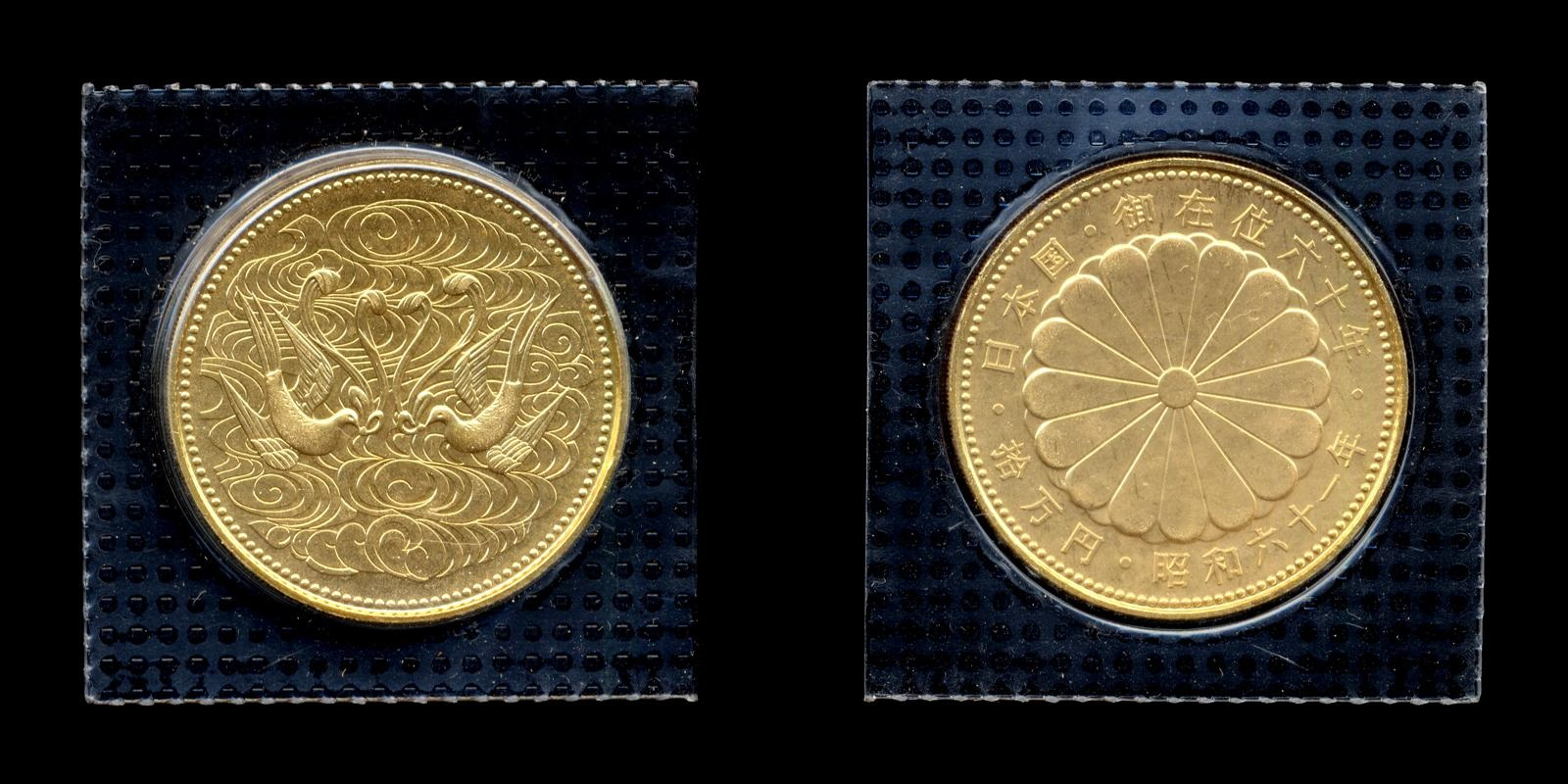 天皇陛下御在位六十年十万円記念貨幣